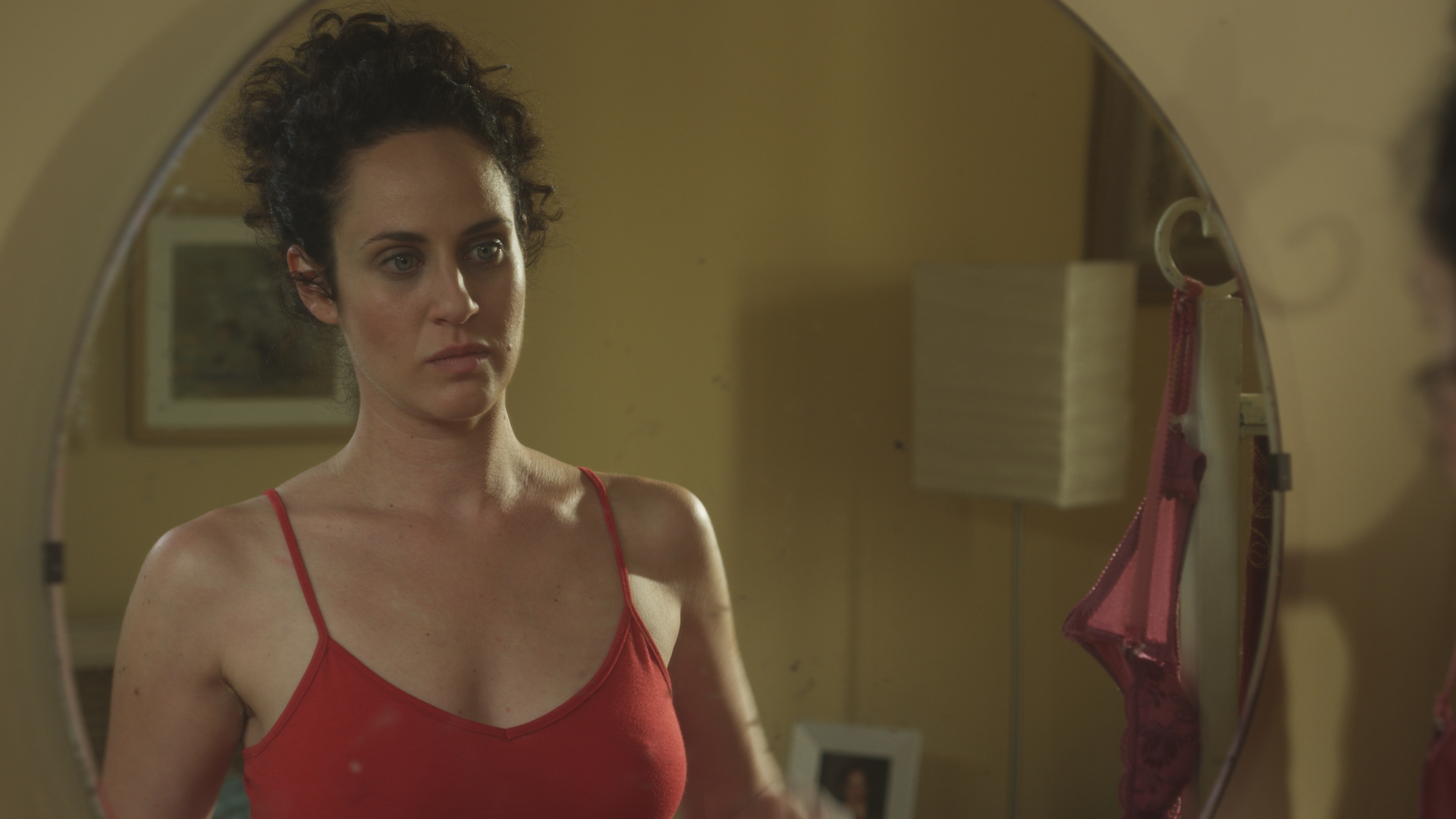 יעל טוקר בסרטו של דובר קוסאשווילי "רווקה פלוס"